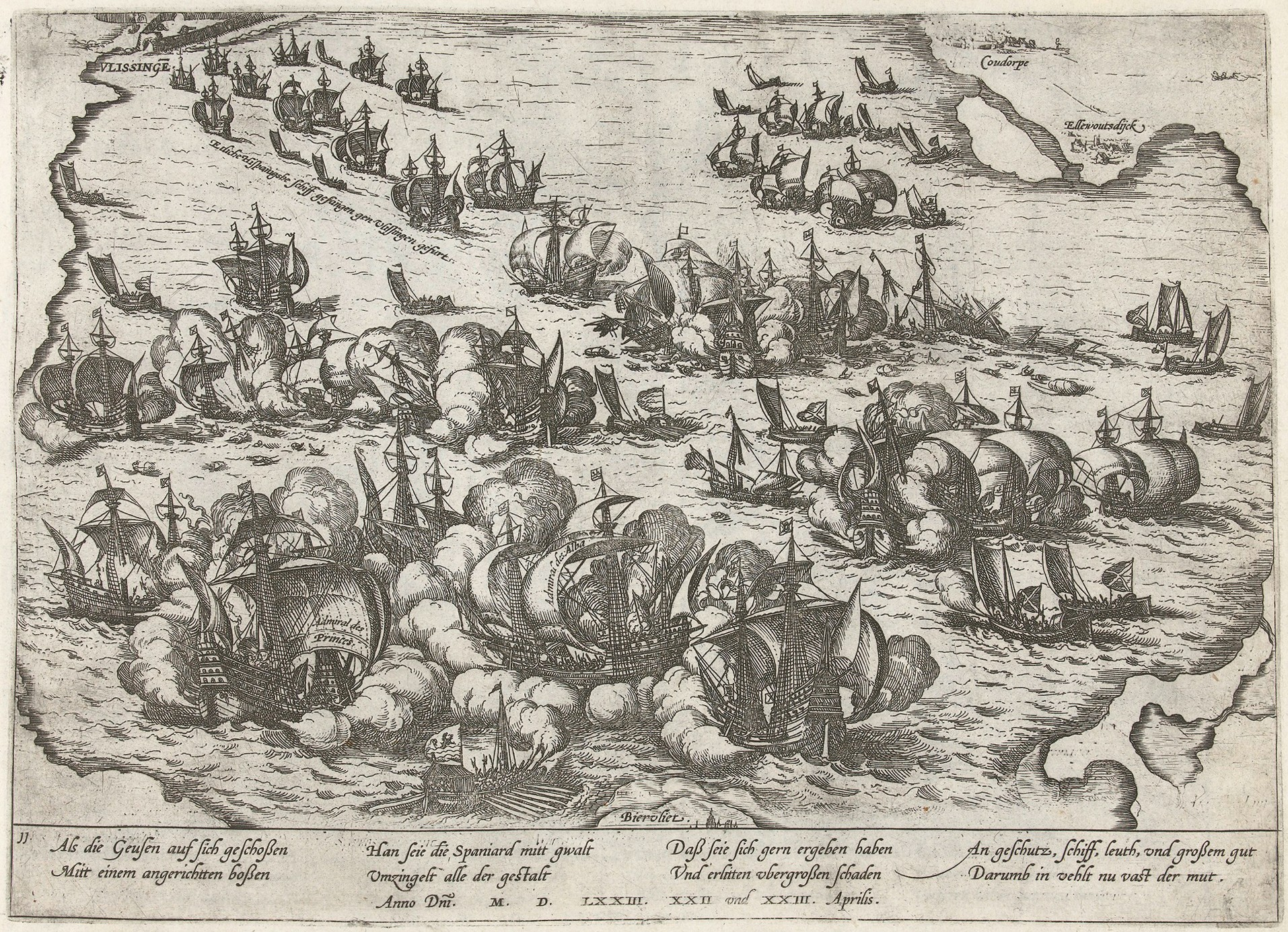 Slag op de Westerschelde bij Vlissingen op 22 en 23 april 1573